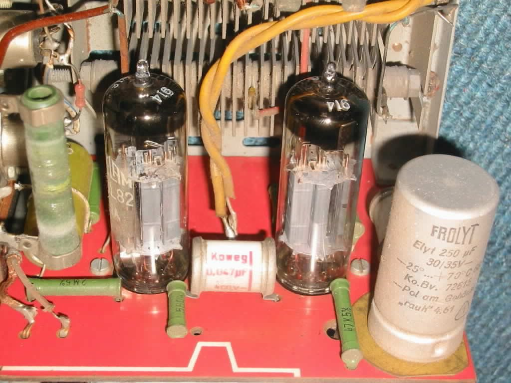 Heli Stereoverstaerker HS1